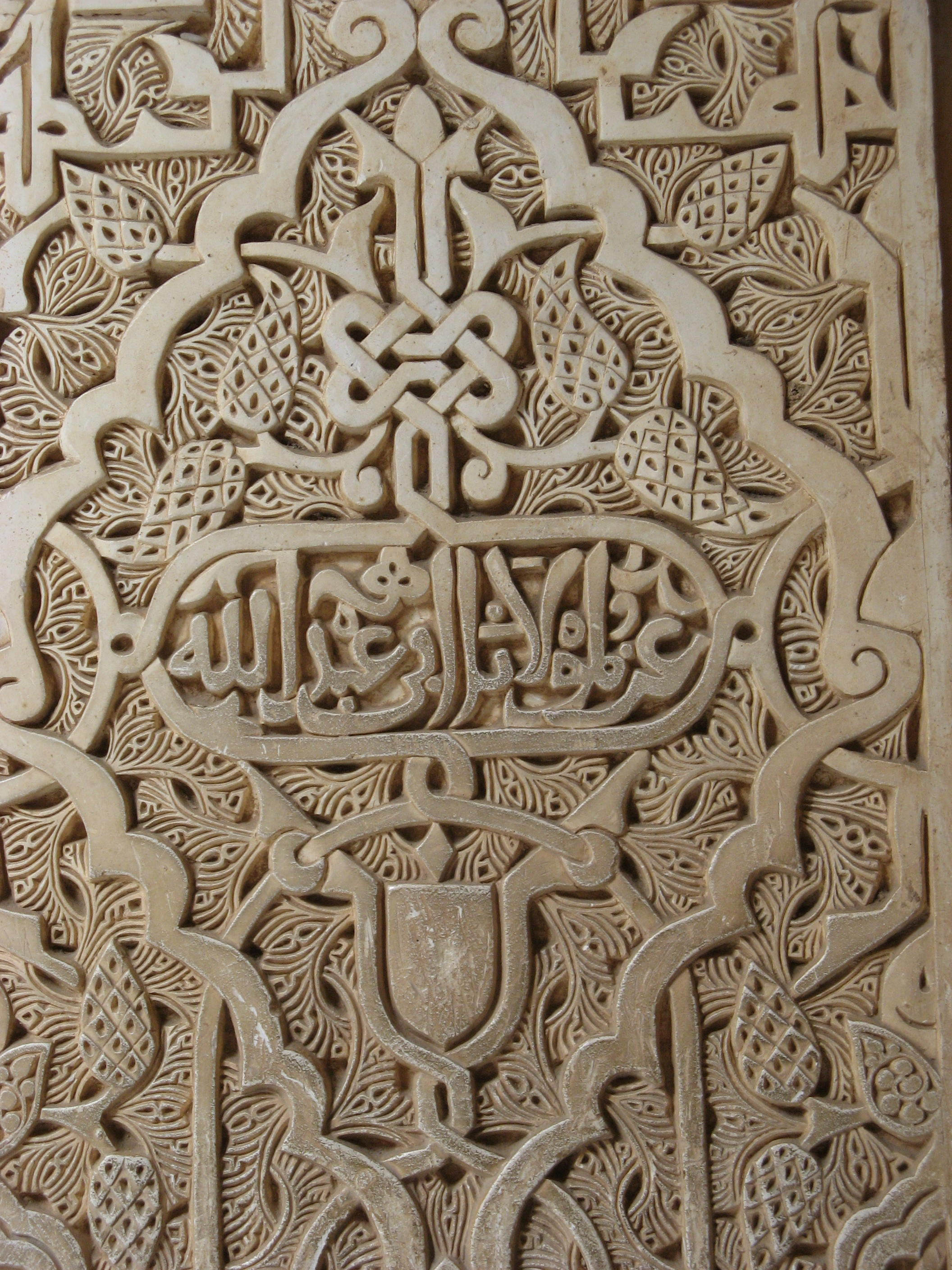 Alhambra in Granada, Spain - Detail